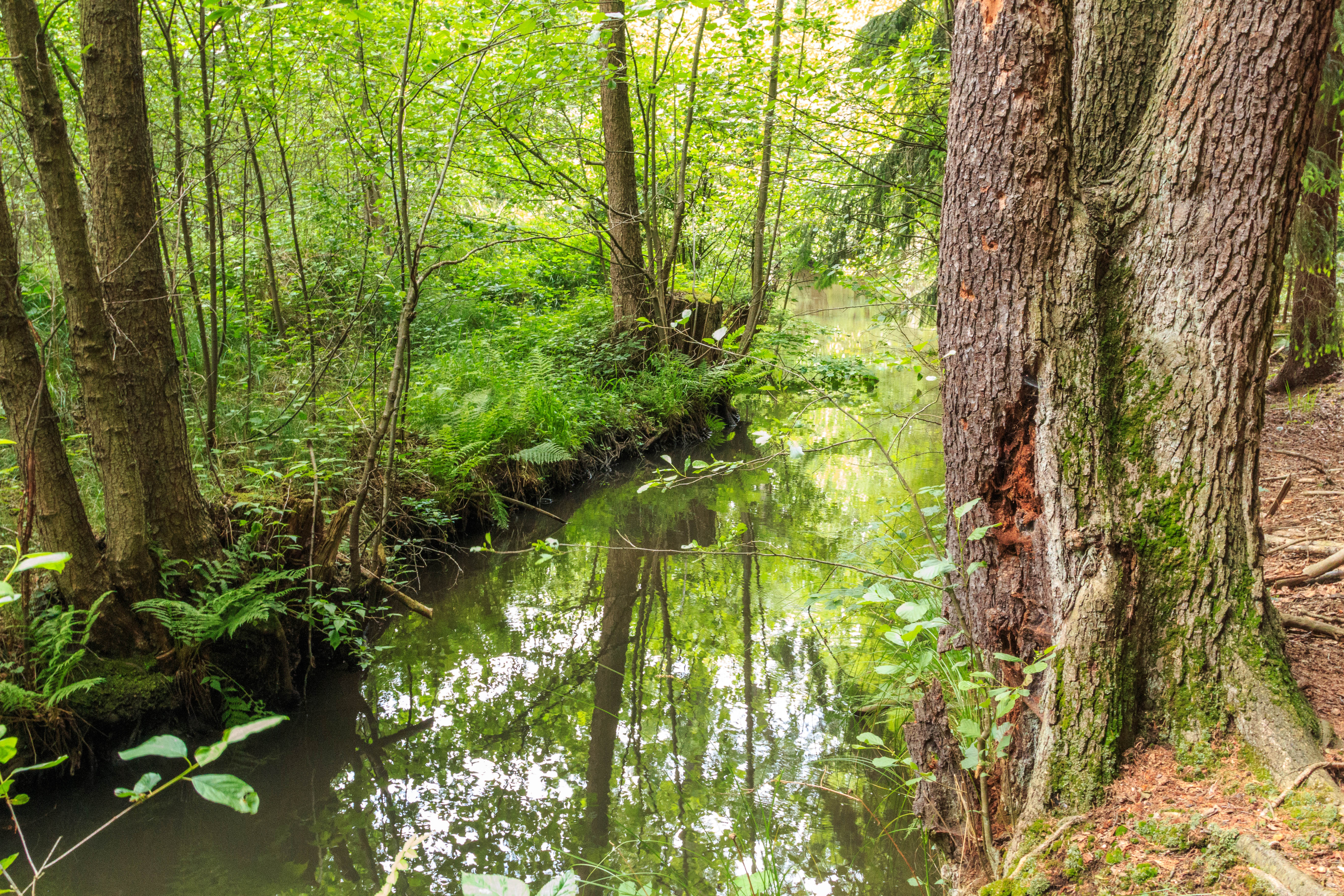 Přírodní památka Týnišťské Poorličí Project: Chráněná území.